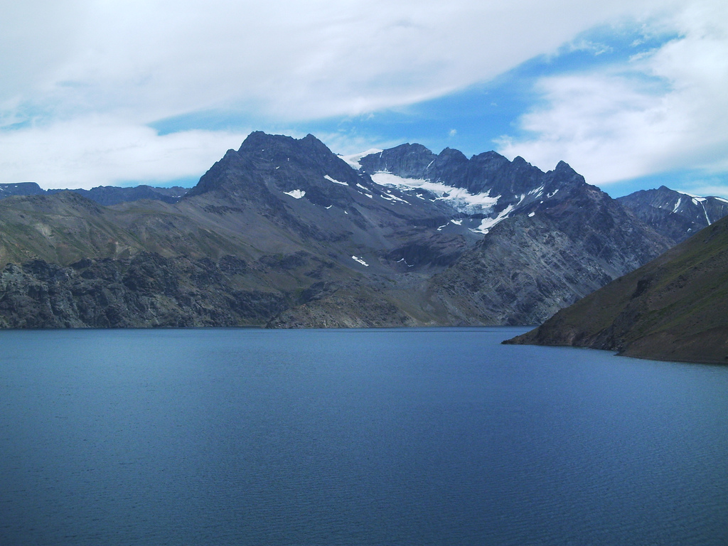 Laguna Negra, ubicada en los Andes chilenos cerca de Santiago